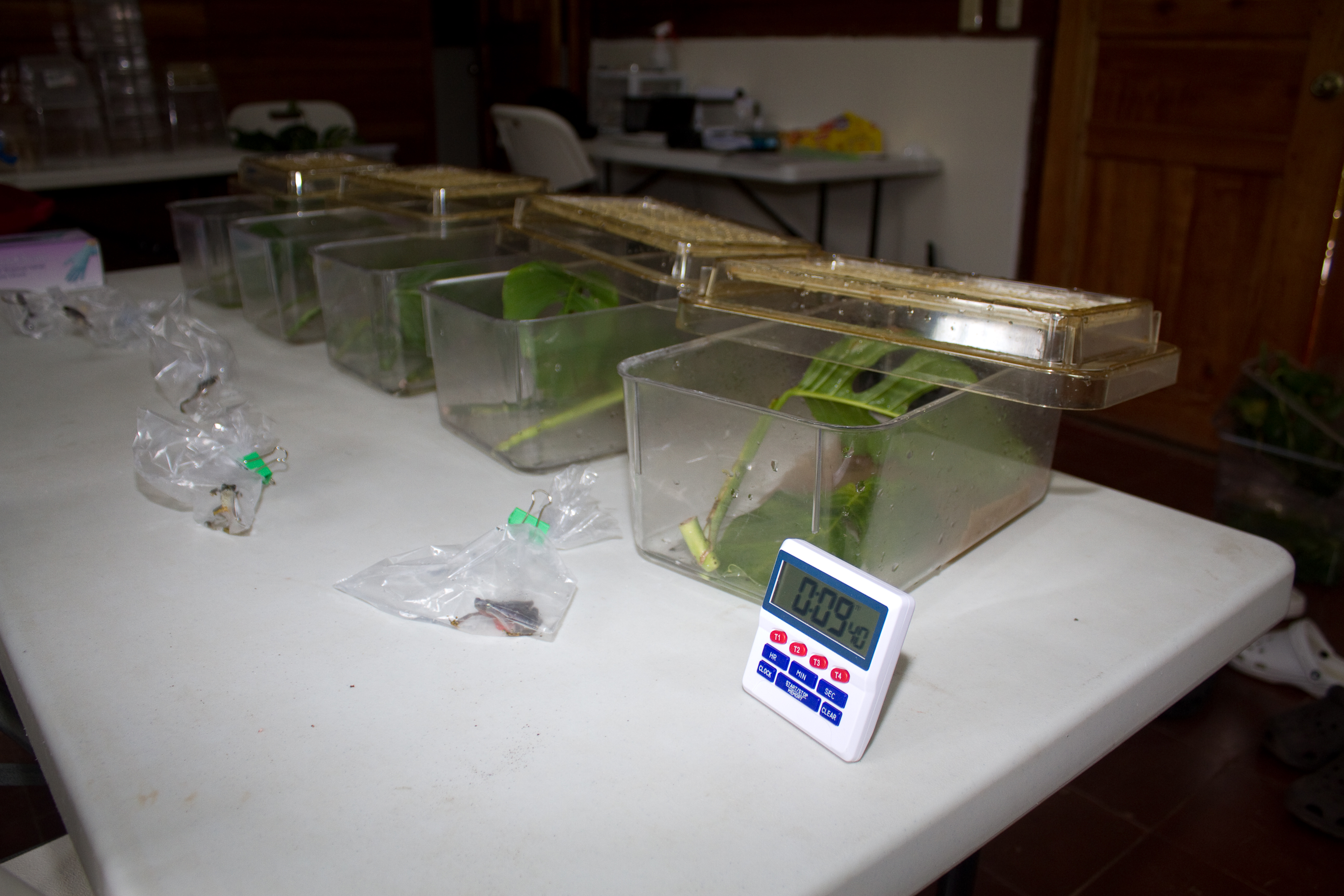 Itroconozole bath-time